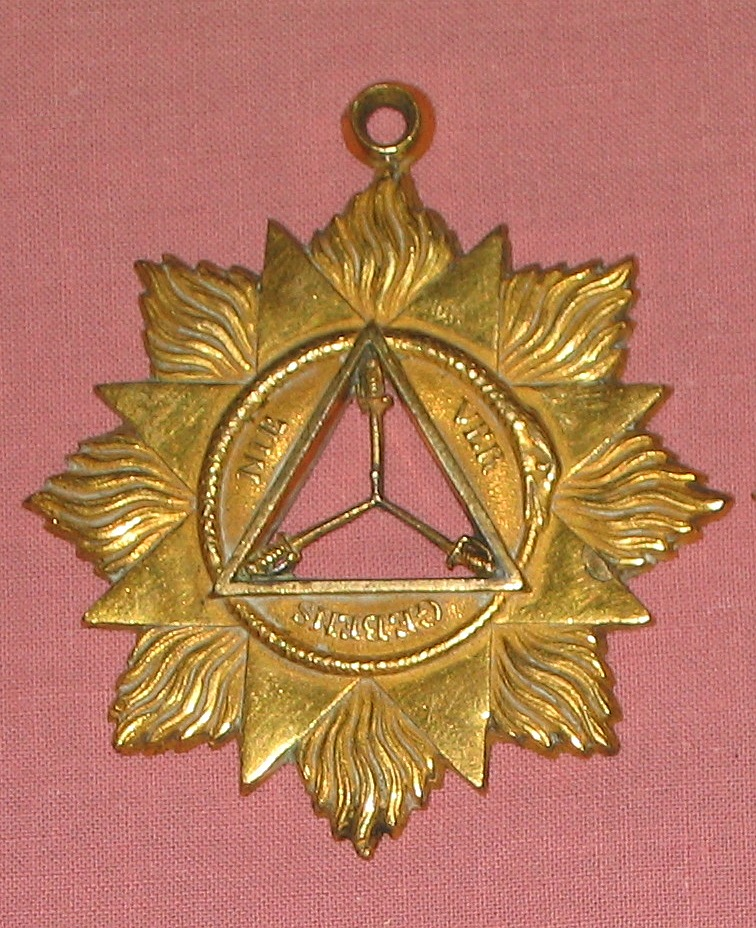 Logenbijou (Mitgliedszeichen) der ehemaligen Freimaurerloge „Zu den drei Degen“